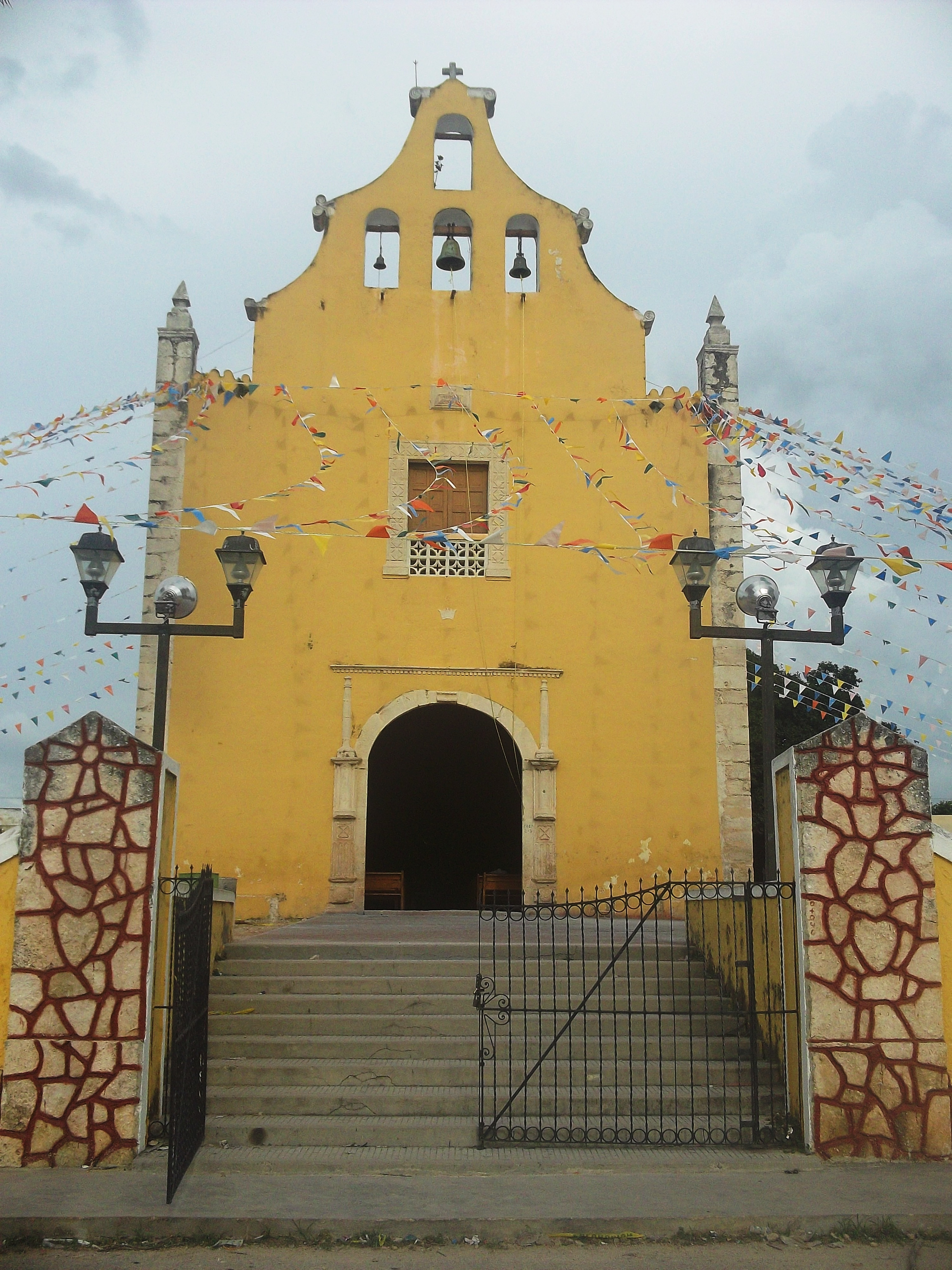 Iglesia de Tetiz, Yucatán.